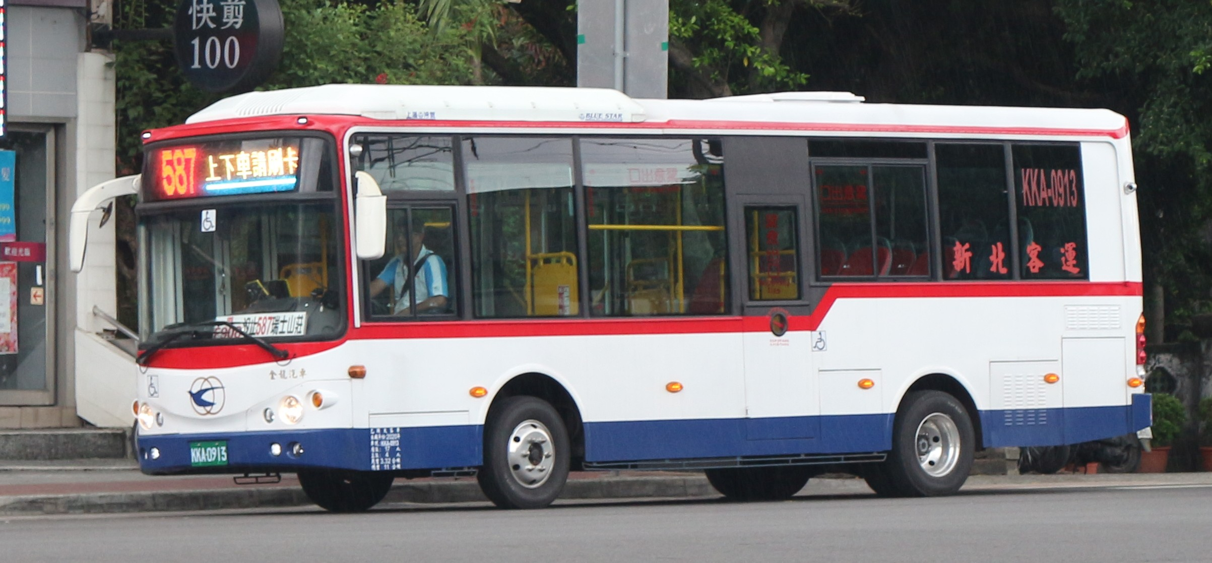 中文（台灣）: 新北客運2020年KINGLONG KL6850A2大客車KKA-0913，行駛587線。